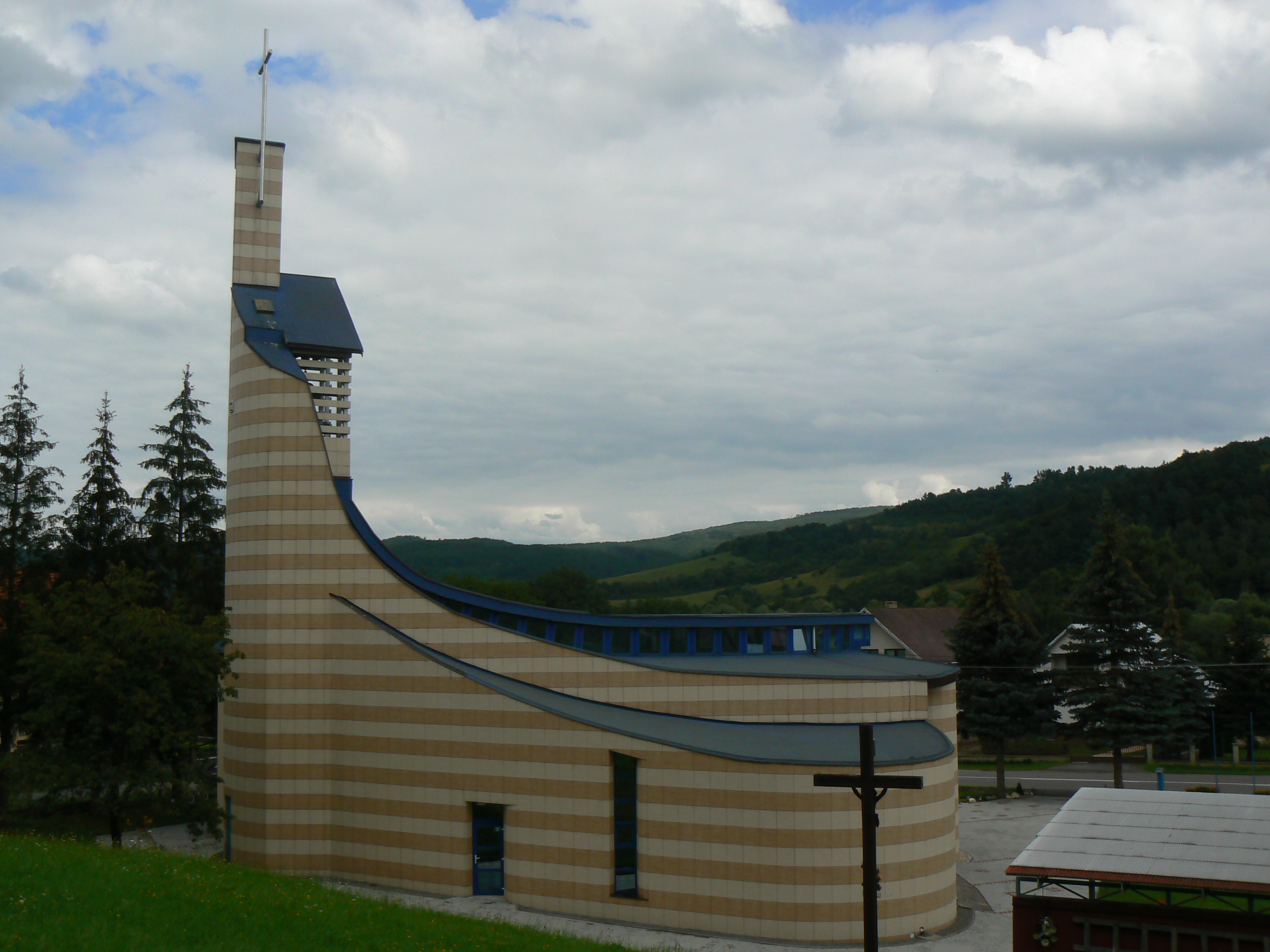 Kostol Nanebovzatia Panny Márie, Hankovce.